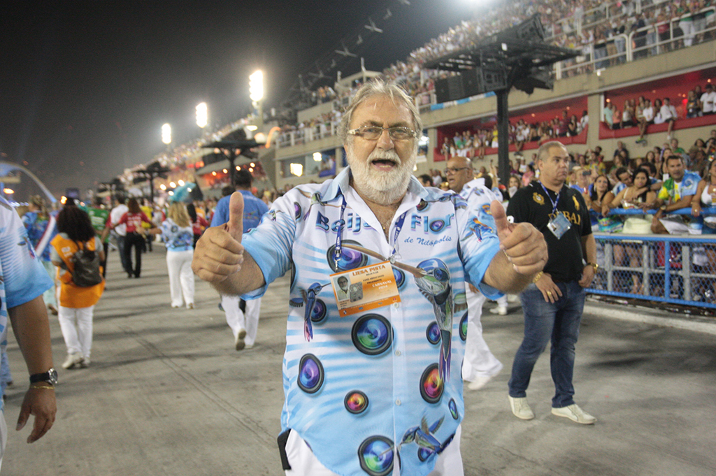 Desfile das escolas de samba do Rio de Janeiro de 2014. (Foto Henrique Matos)